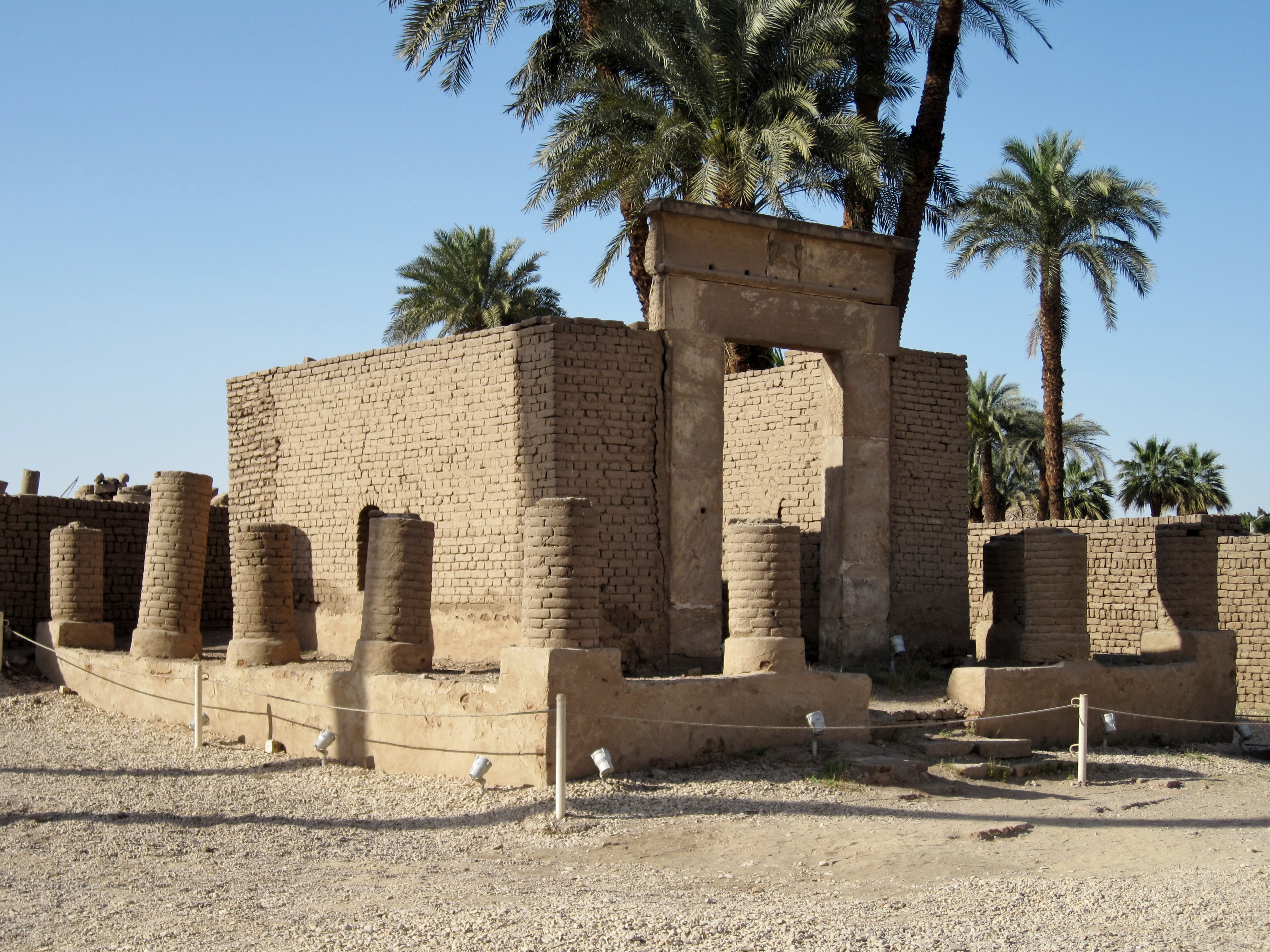 Serapis-Kapelle vor dem Luxor-Tempel, Ägypten